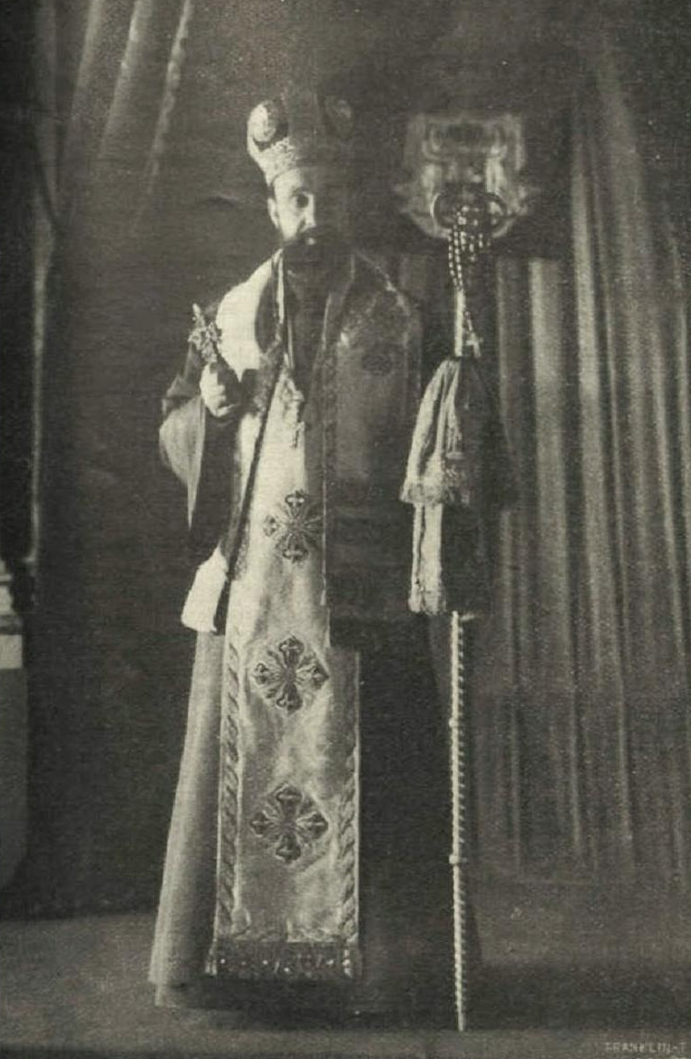 Lukijan Bogdanović